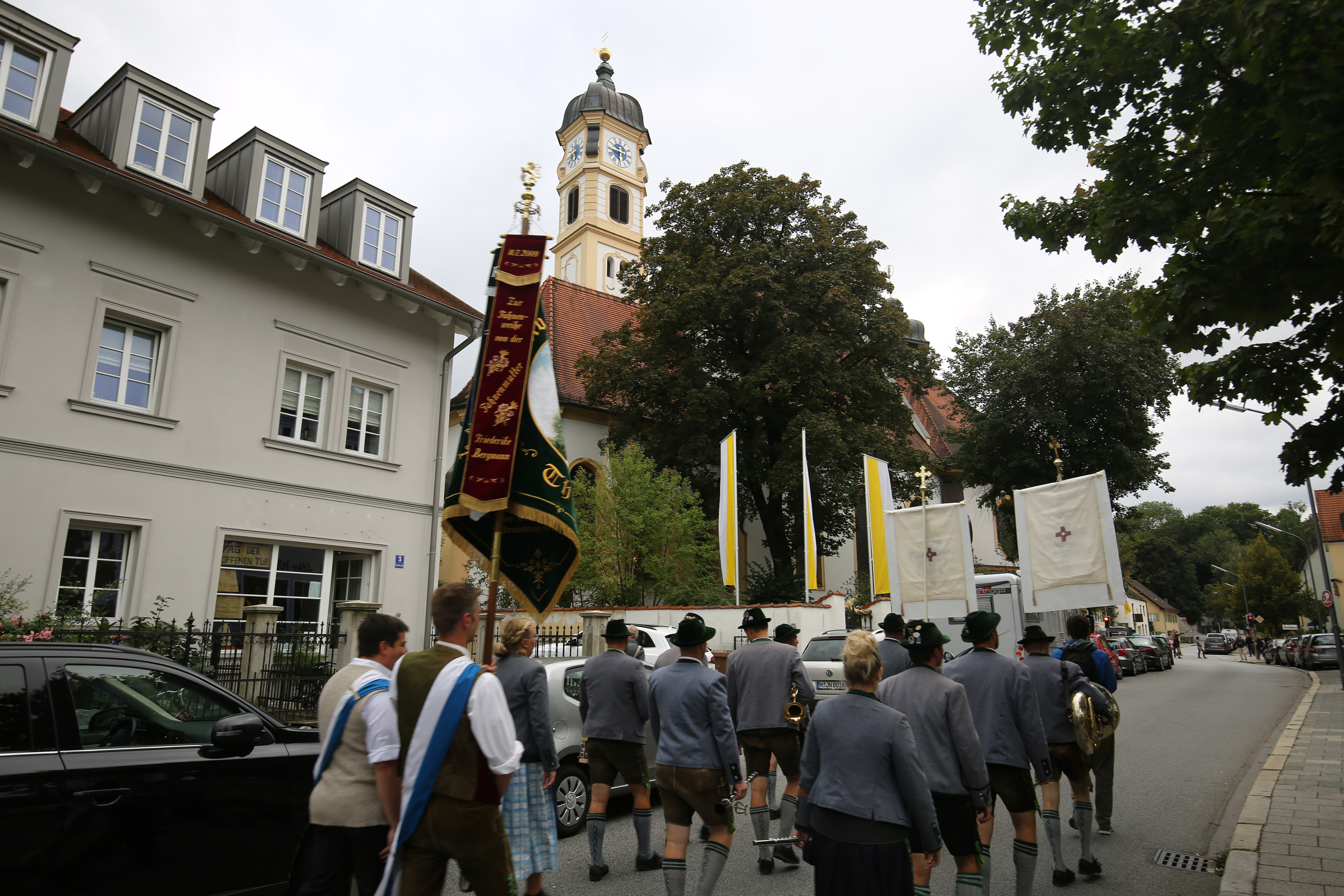 Flößerwallfahrt Thalkirchen 2018. Die Wallfahrt findet im fünf jährigen Turnuns statt und fährt auf der Isar von Wolfratshausen nach München-Thalkirchen. Landung der Flöße an der Floßlände und Prozession zur Kirche St. Maria Thalkirchen. Dort Heilige Messe. 2018 mit Weihbischof emeritus Franz Dietl.